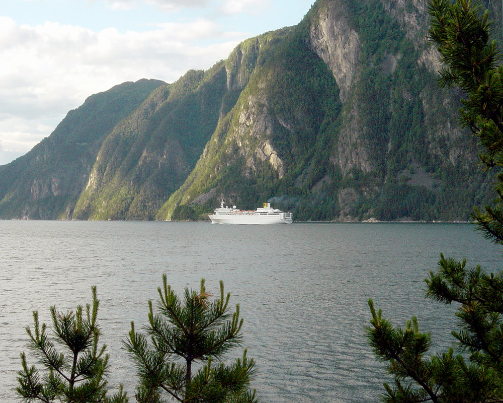 Stranda and the Storfjorden på Sunnmøre